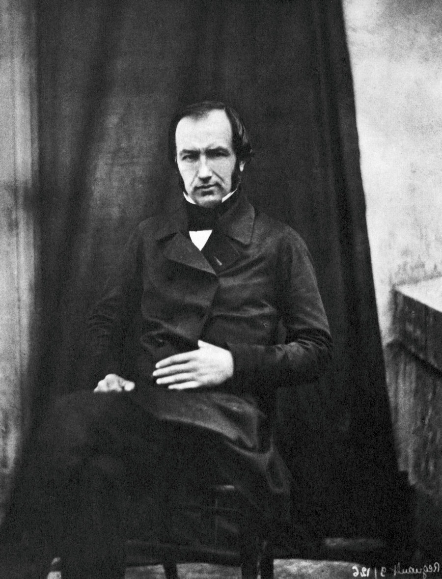 Claude Bernard (1813-1878), photographie par Henri Victor Regnault, 1851. Localisation non précisée.